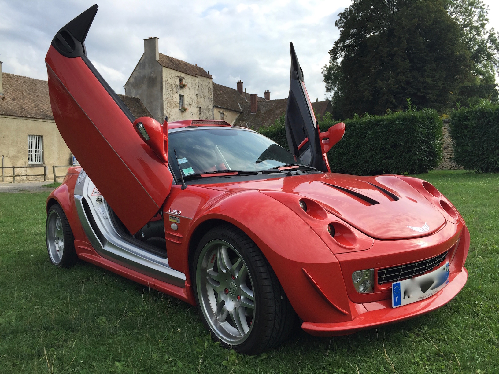 Smart roadster de 2006 avec préparation carrosserie et lambo doors